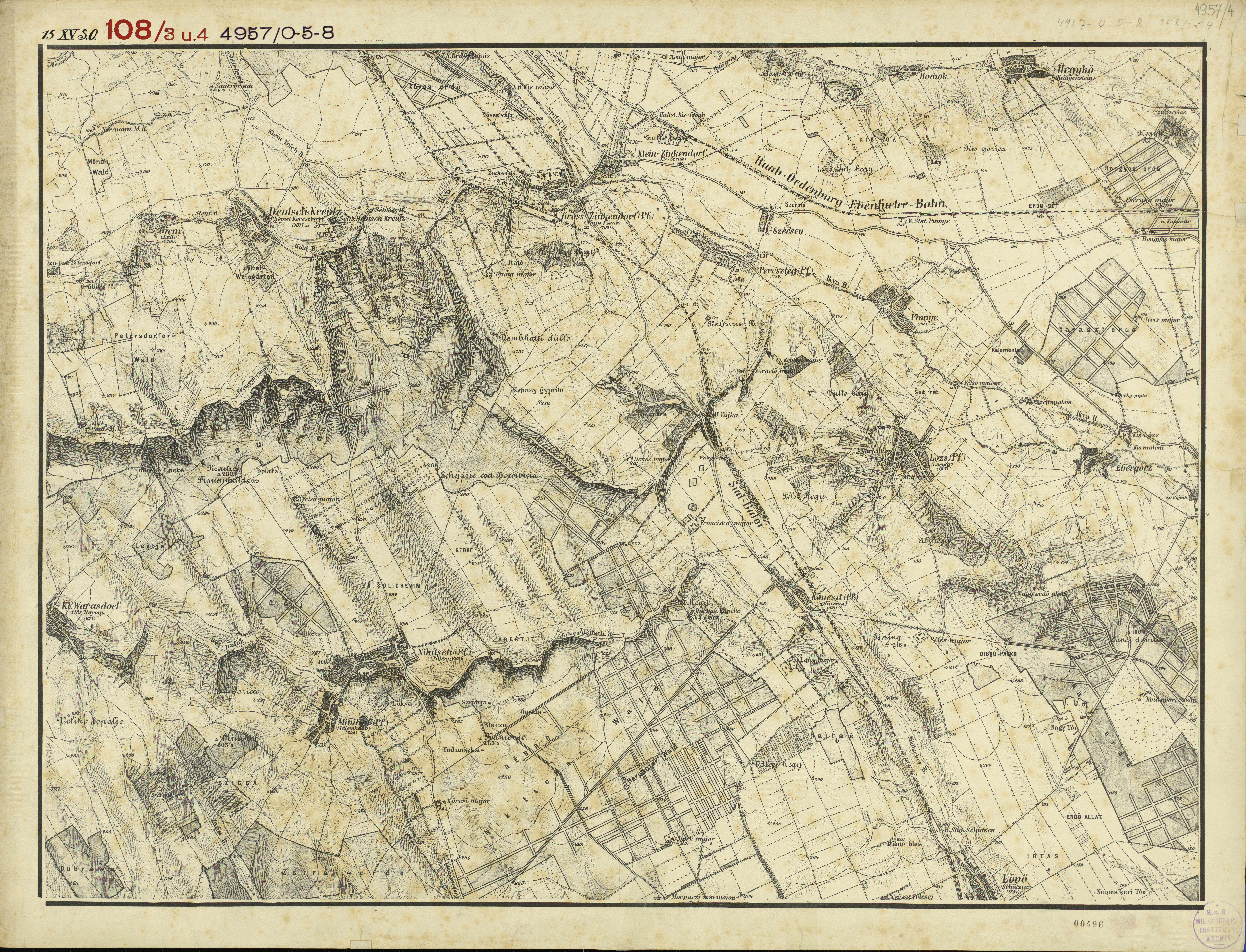 historische Landkarte: Arbeitsfassung von: Gradkartenblatt Zone 15 Colonne XV Section SO (Nordost) (später 4957/4 oder 4957/0-5-8 oder 108/3 und 4). Deutschkreuz / Nemet Kéresztur, Girm, Unter Petersdorf, Klein Warasdorf, Nikitsch, Schützen / Lövö, Minihof, Groß Zinkendorf / Nagycenk, Pereszteg, Heiligenstein / Hegykö, Losing / Lodz in Westungarn, später Mittelburgenland. Franzisco-josephinische (3.) Landesaufnahme der österreichisch-ungarischen Monarchie. Maßstab 1:25.000. Keine Angaben über den Stand (um 1880 mit Nachträgen)